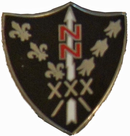 Objet présenté au Musée de l'aéronautique Bétheny, avec leur aimable autorisation de versement en ligne.